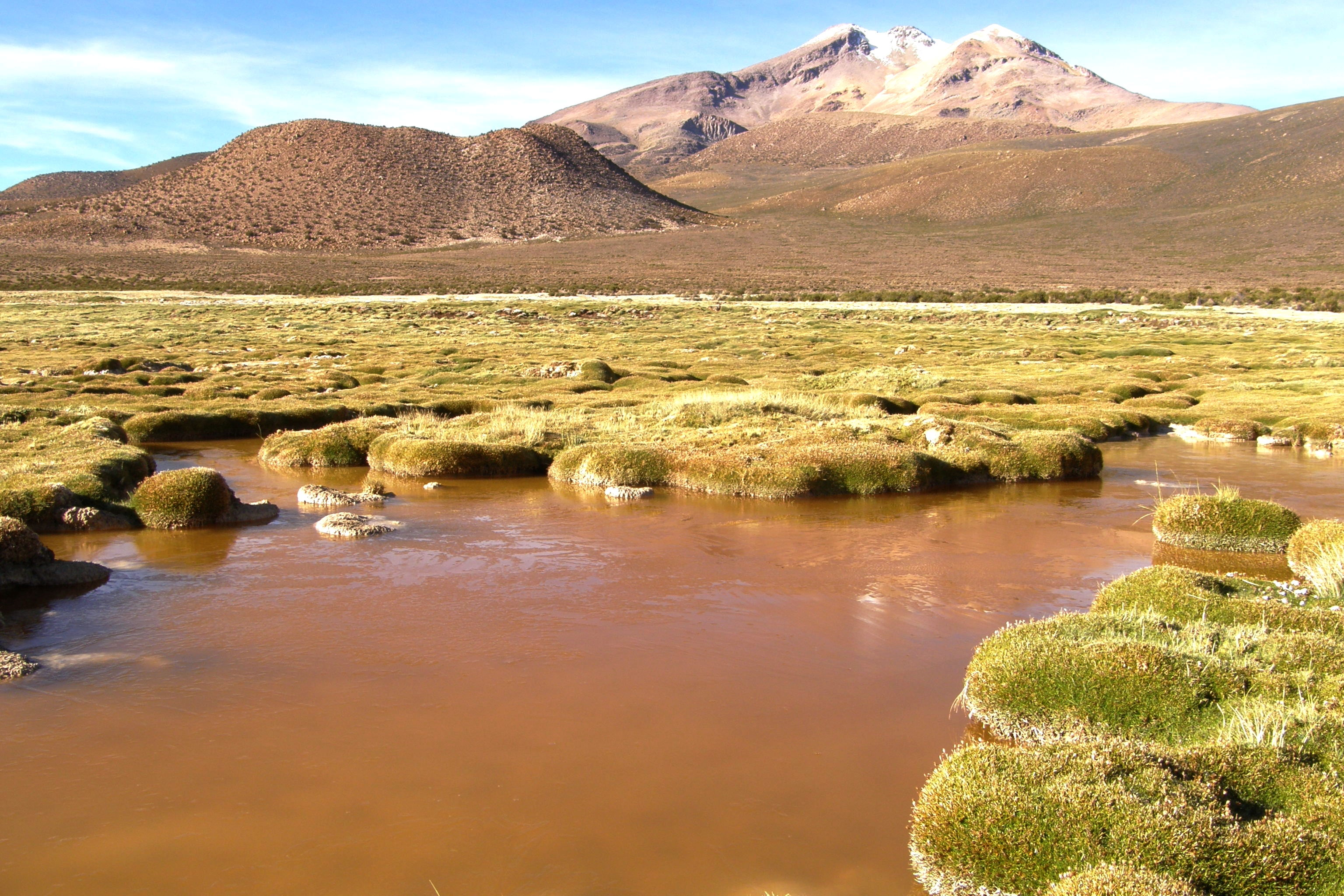 Un bofédal au 1er plan sur la rive sud du Salar de Surire, derrière le Cerro Chihuana, 5279 m, Commune de Putre, province de Parinacota, région XIII ou d'Arica et Parinacota, Chili